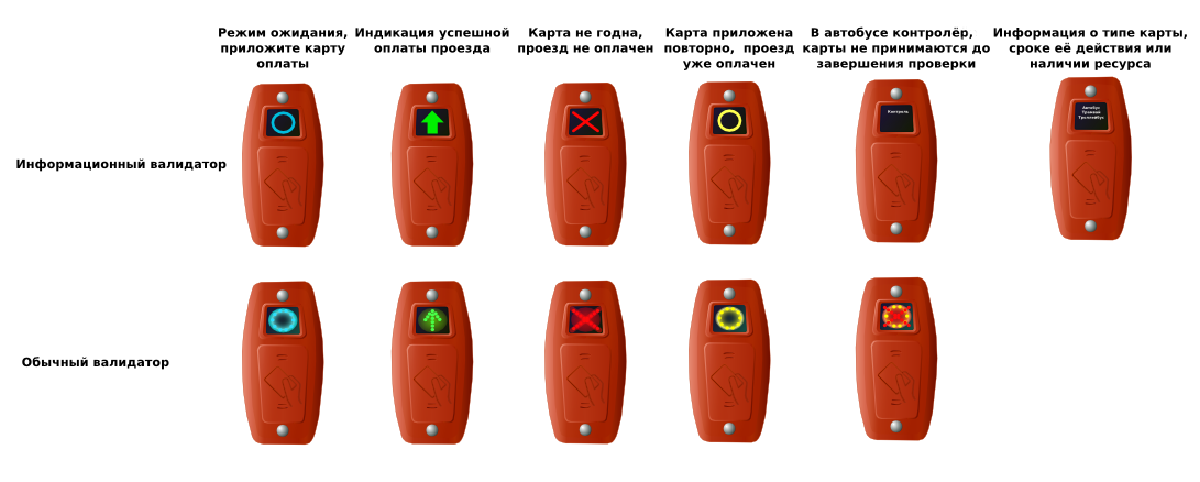 Стационарные валидаторы СЭКОП, используемые на наземном общественном транспорте Петербурга. В верхнем ряду информационные валидаторы, в нижнем - простые.